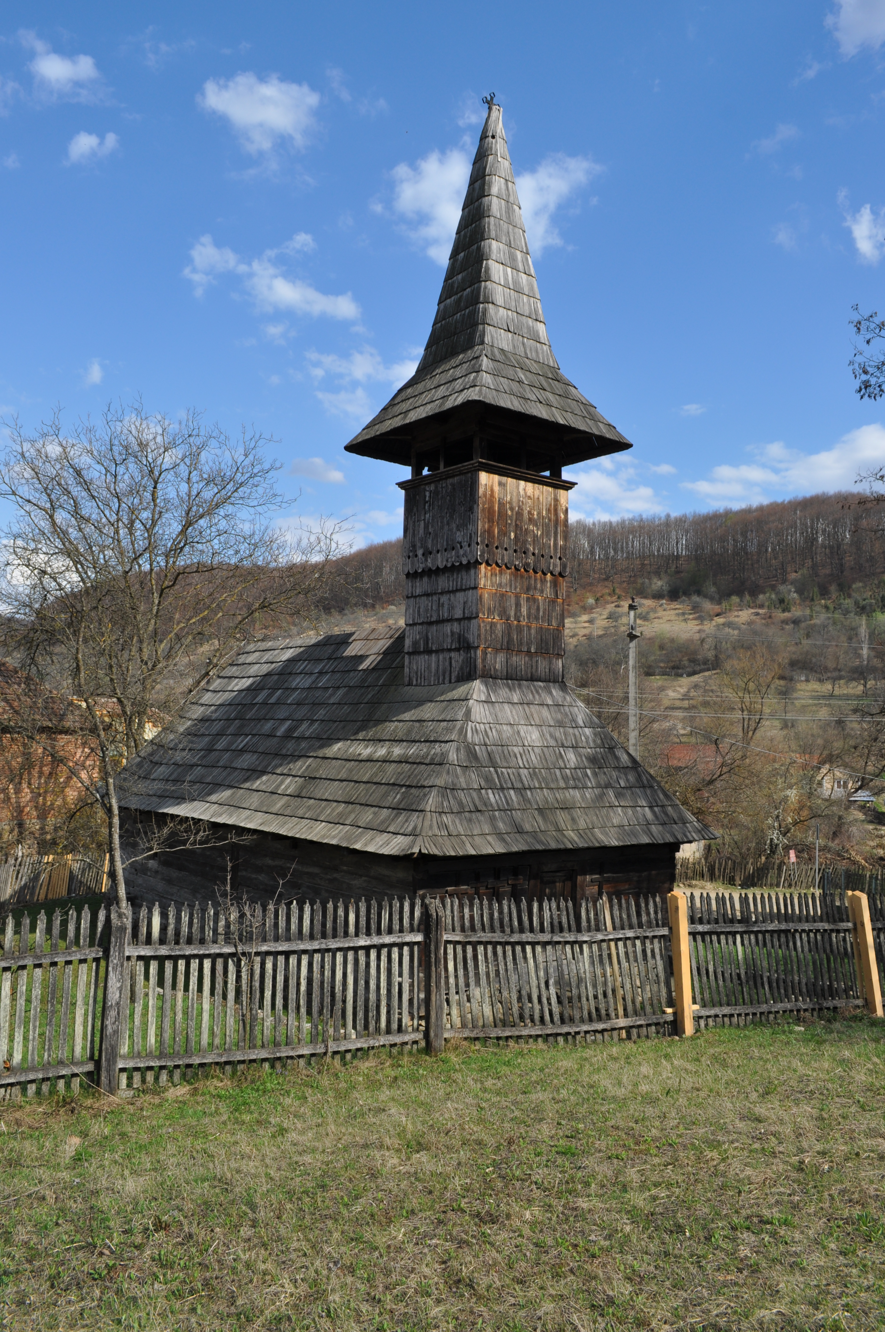 Biserica de lemn "Întâmpinarea Domnului", sat GROŞII NOI; comuna BÂRZAVA